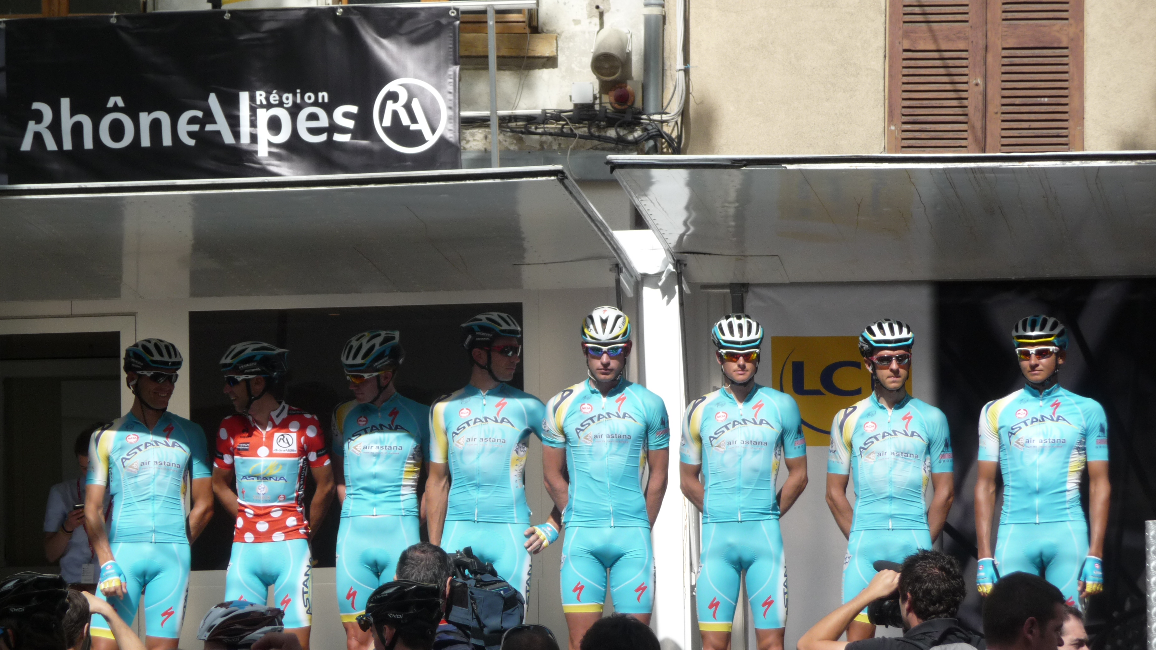 Présentation des équipes du Critérium du Dauphiné 2014 lors du départ de la 2ème étape à Tarare.